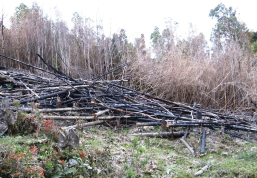 Renoval de bosque valdiviano talado y parcialmente quemado, cercanías de Oncol, Valdivia, Chile